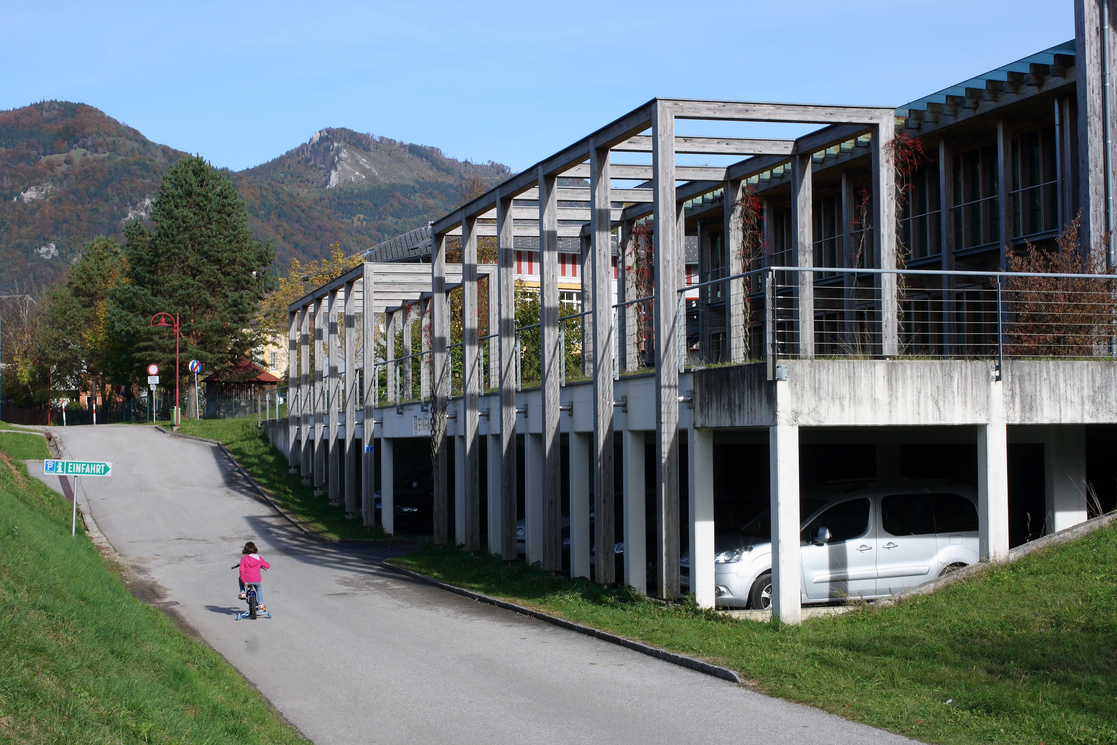 Die Garage unter dem Mollner Nationalparkzentrum. Die Straße davor ist die Nationalparkallee